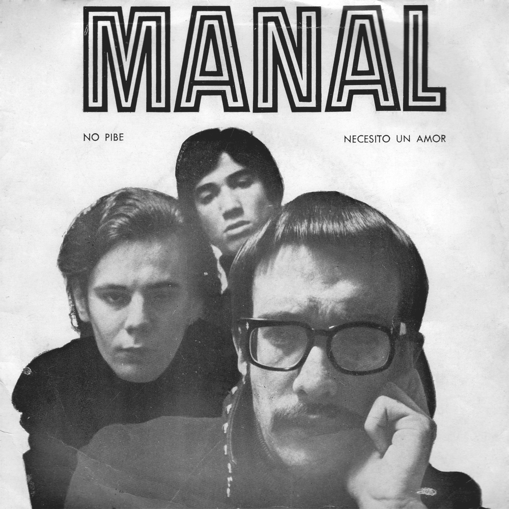 Este fue el segundo single de Manl editado en 1969 por el sello Mandioca